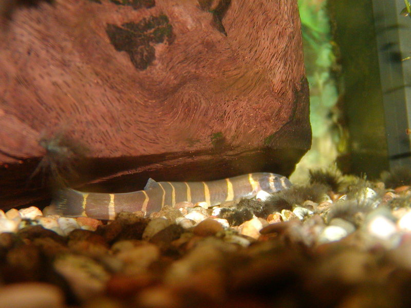 Licence GNU